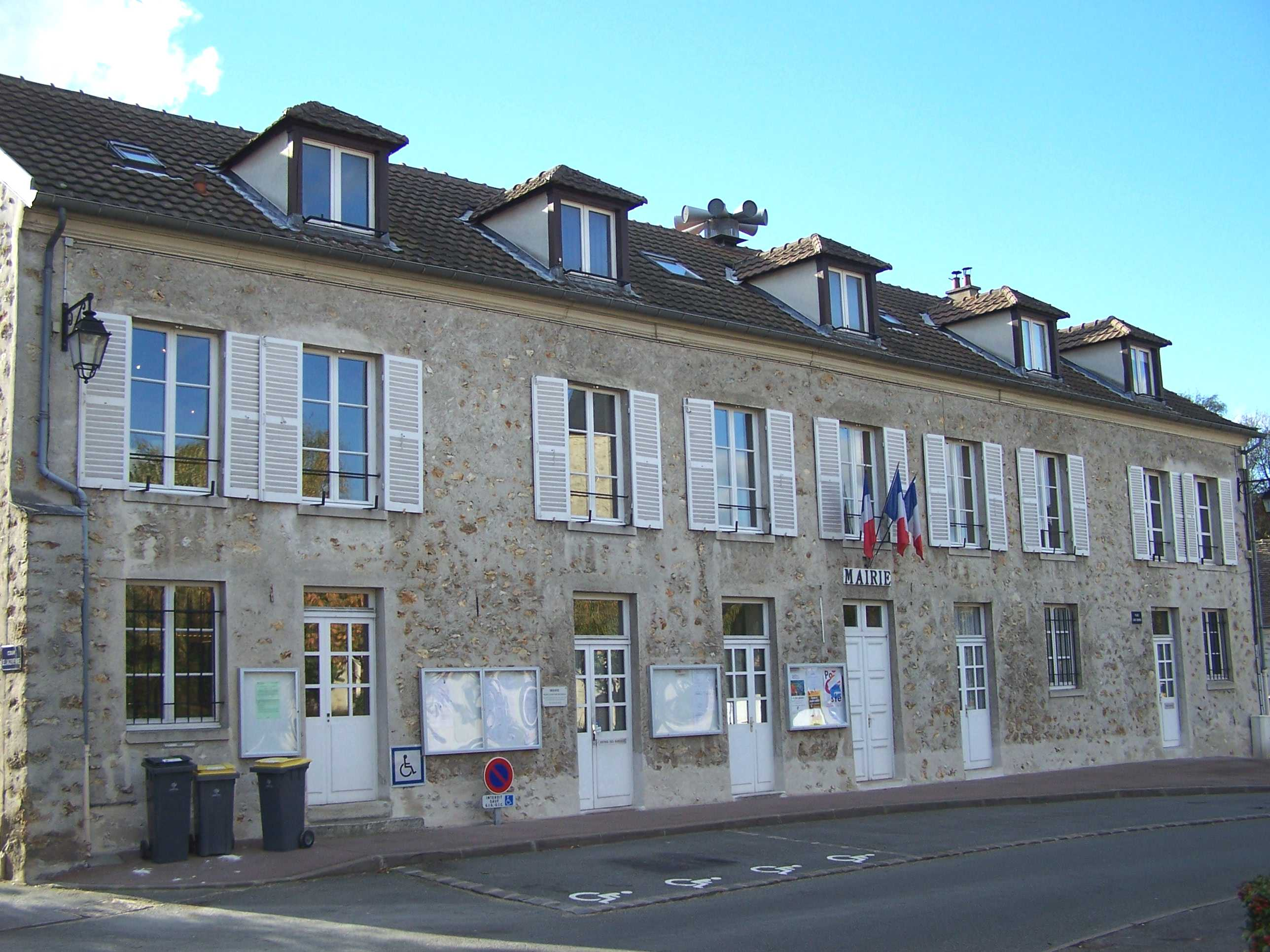 Mairie des Loges-en-Josas (Yvelines, France)